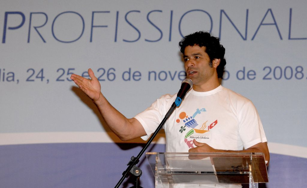 Raí de Souza Oliveira, ex-futebolista brasileiro